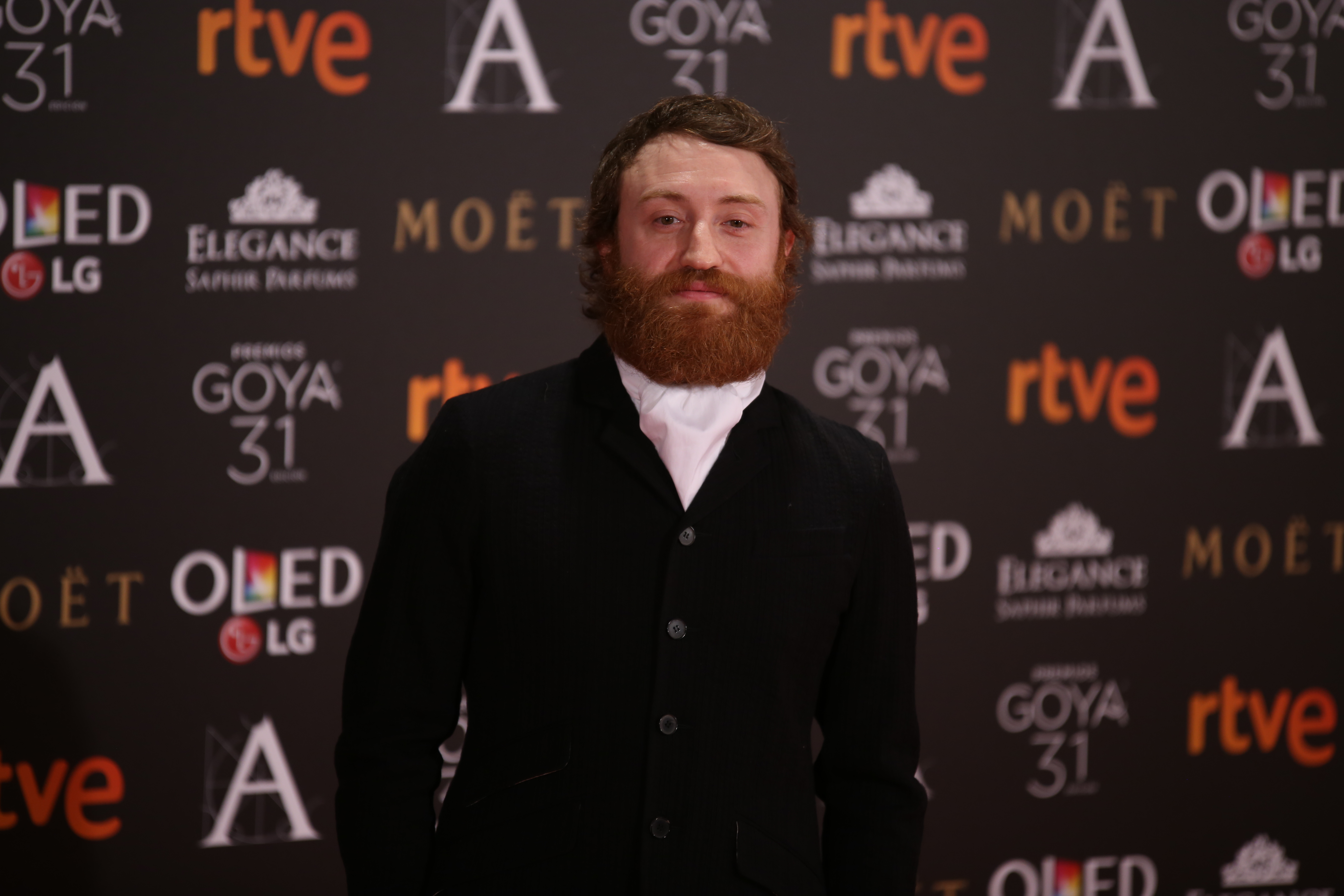 Premios Goya 2017